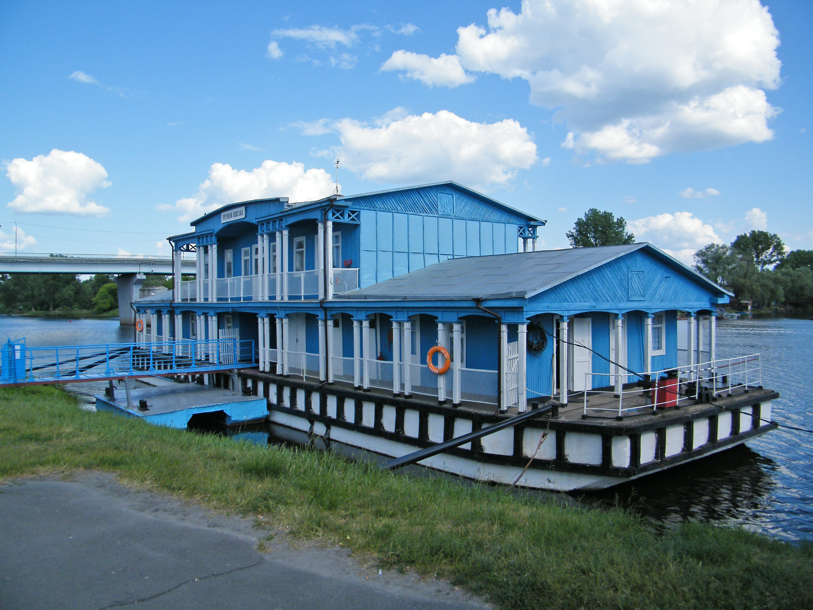 Речной вокзал